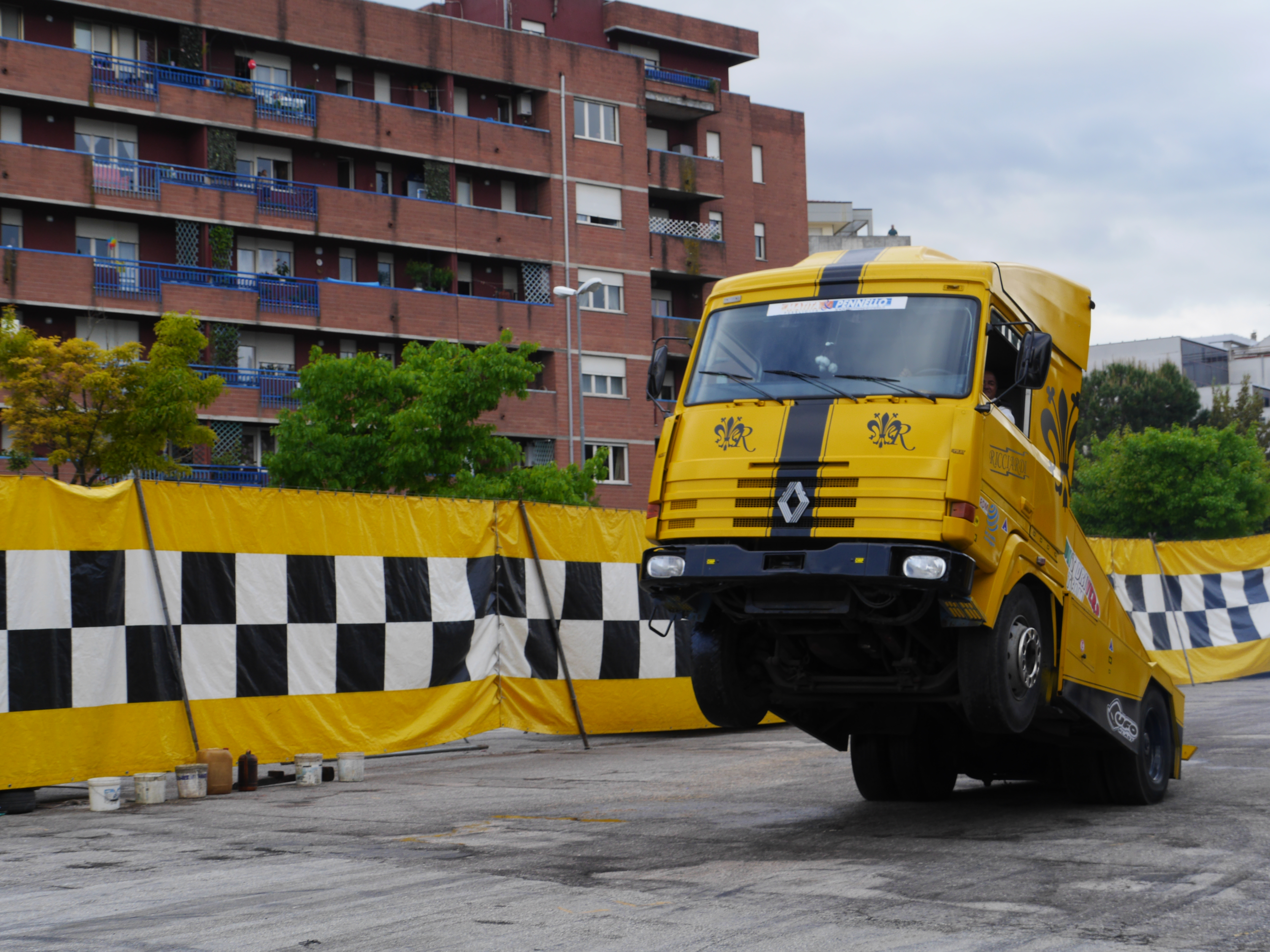 This photo was taken with Panasonic Lumix DMC-GH3 camera, thanks to Panasonic. You can see all photographs in category: Taken with Panasonic Lumix DMC-GH3.